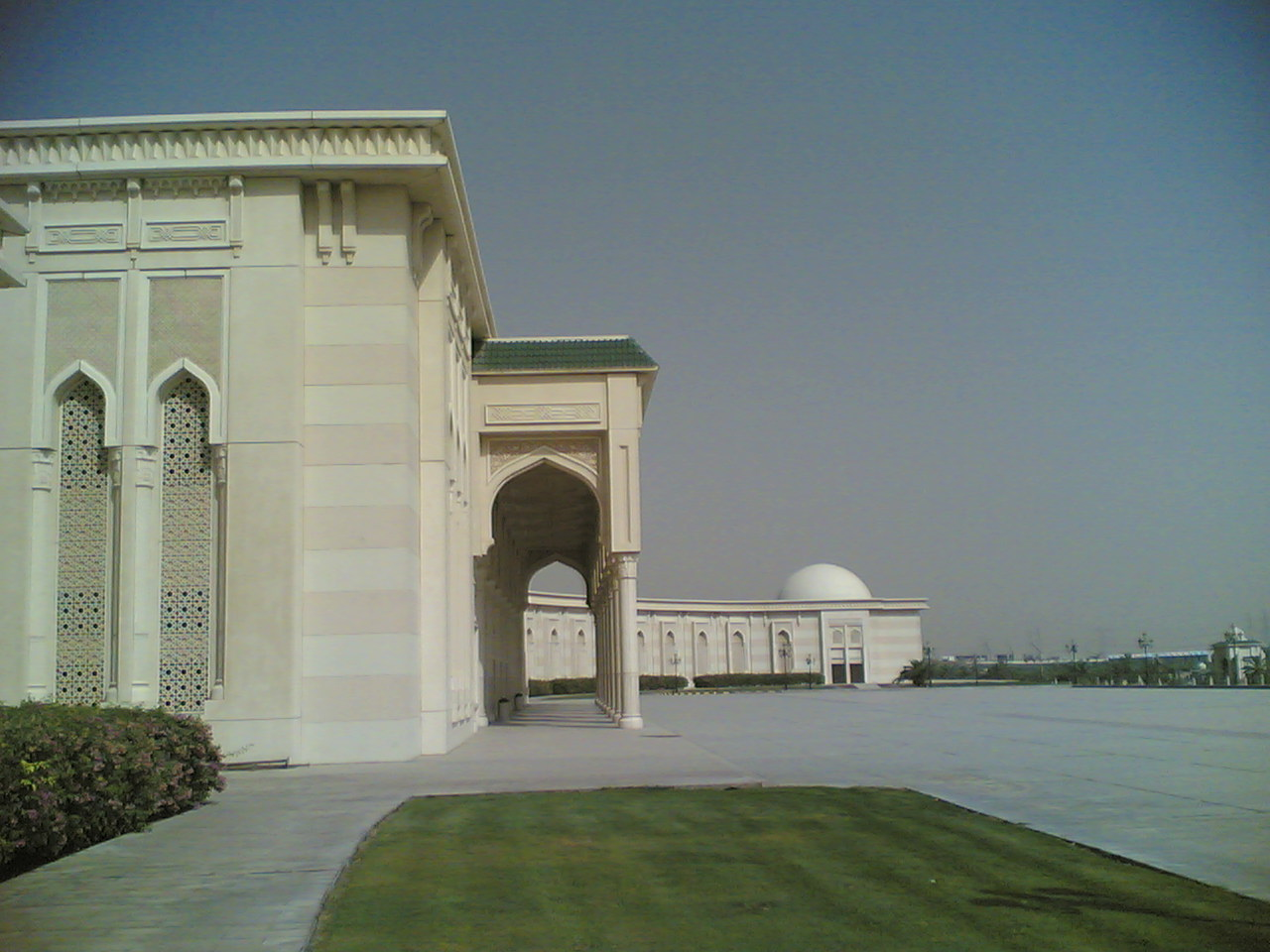 Sharjah Library